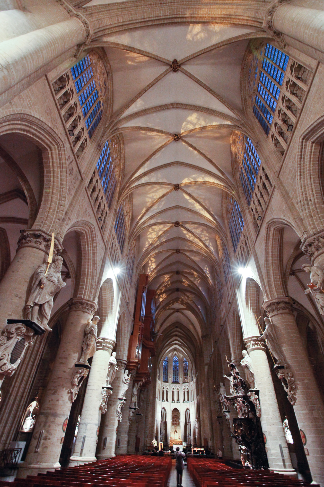 Cathédrale St. Michel et Gudule, Bruxelles, Innenansicht